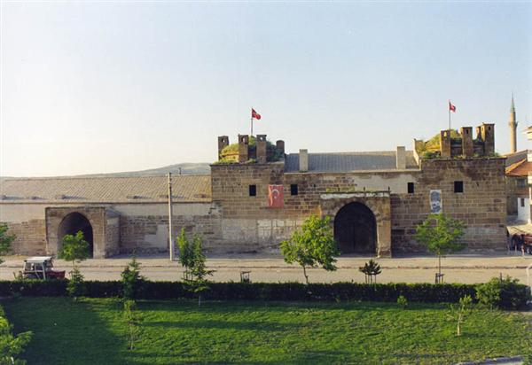 Карвансарай в селе Дёгер